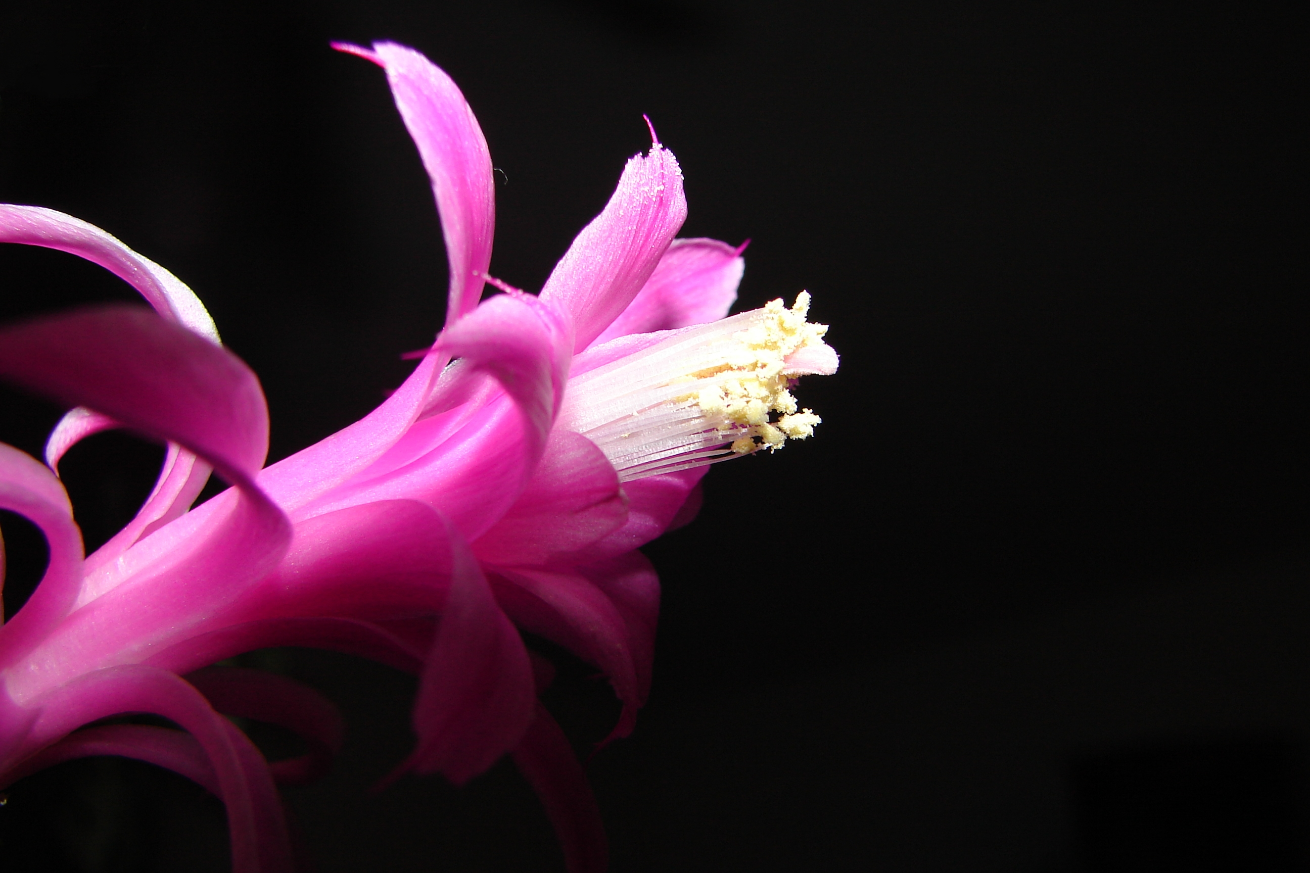 Blüte der Kaktee "Disocatus flagelliformis"